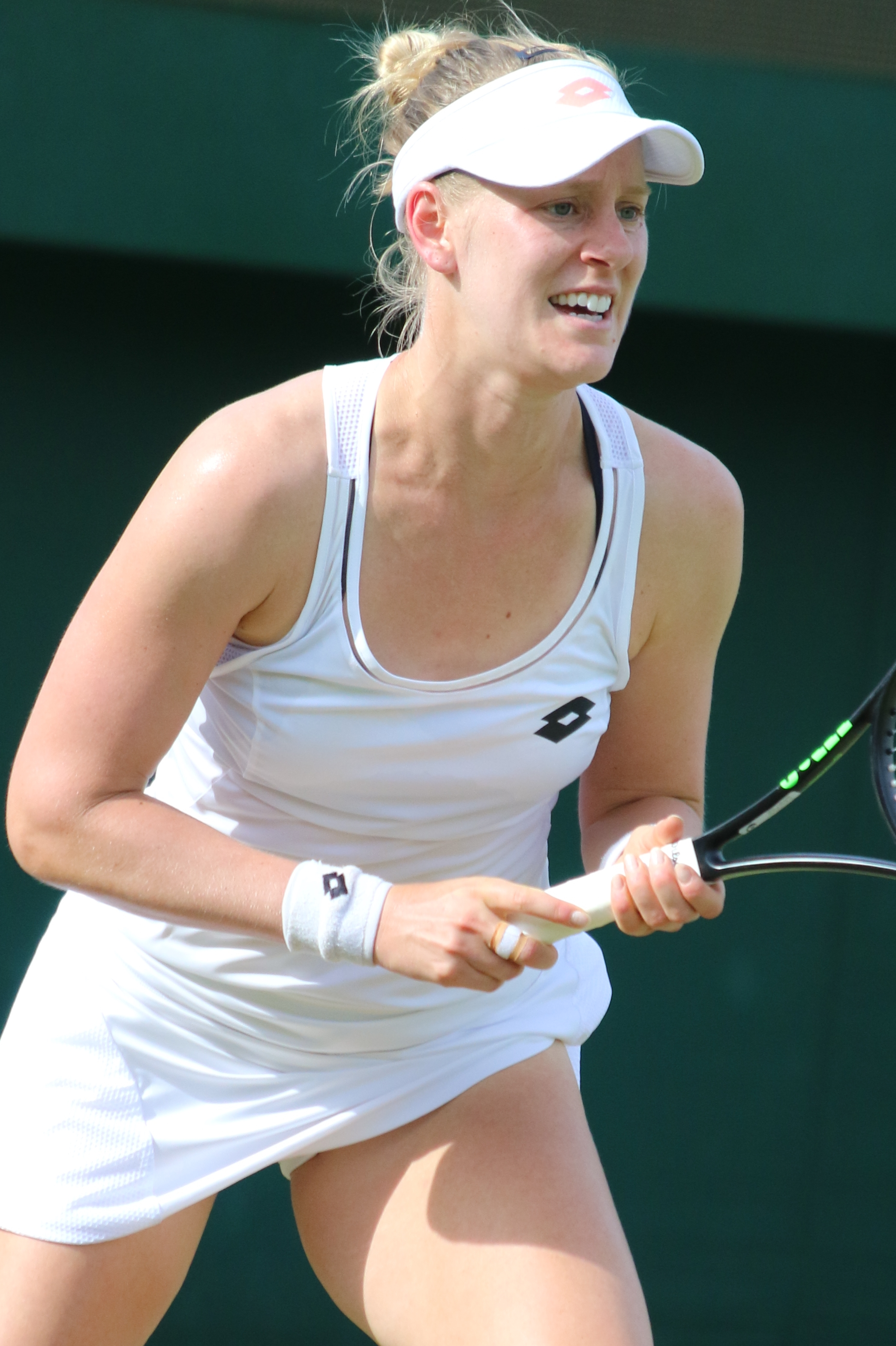 Riske WM17 (17)